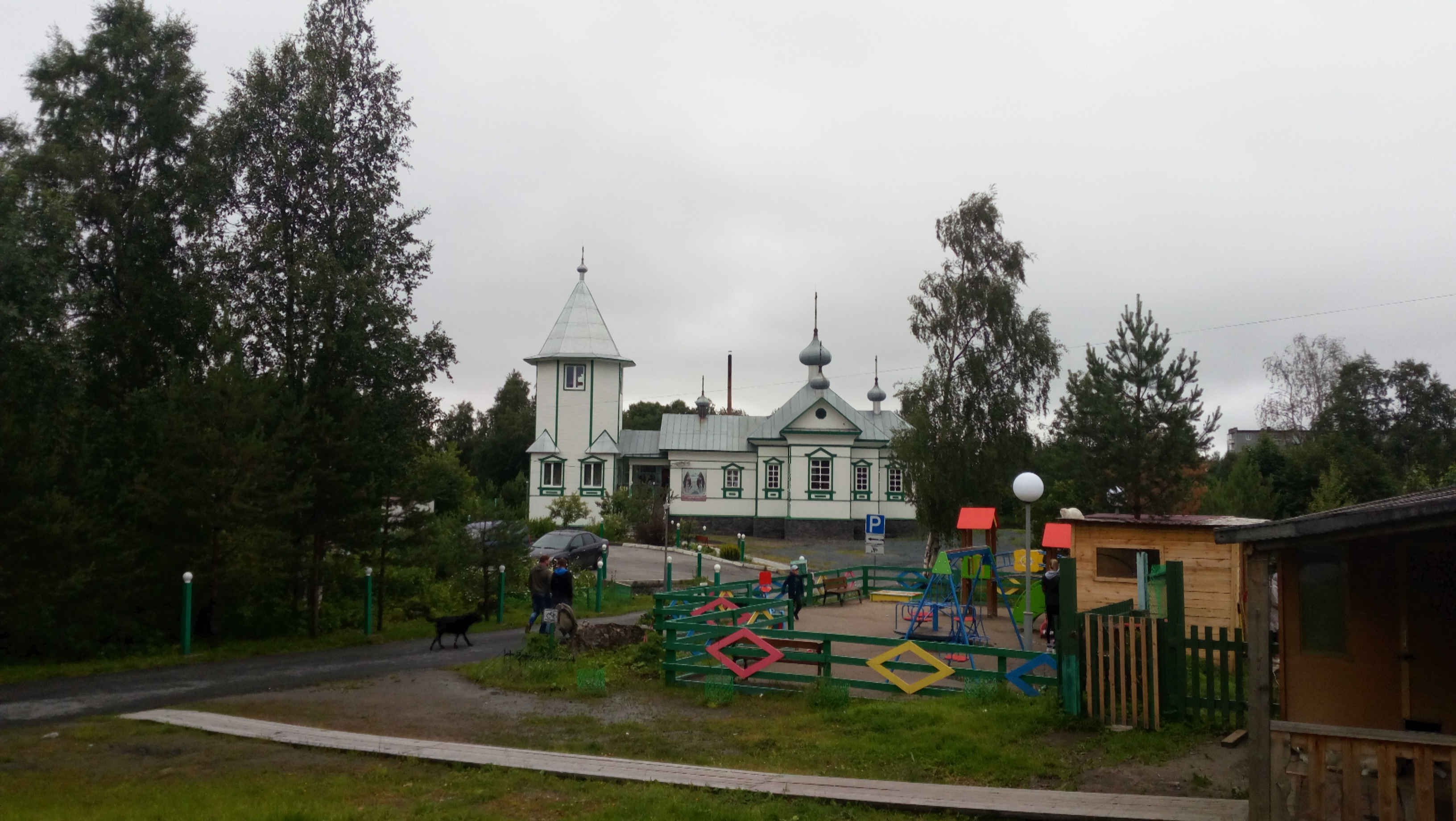 Церковь преподобных Зосимы, Савватия и Германа Соловецких в Беломорске на о. Сорока